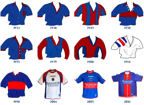 todas las camisetas de todos los años de Tigre